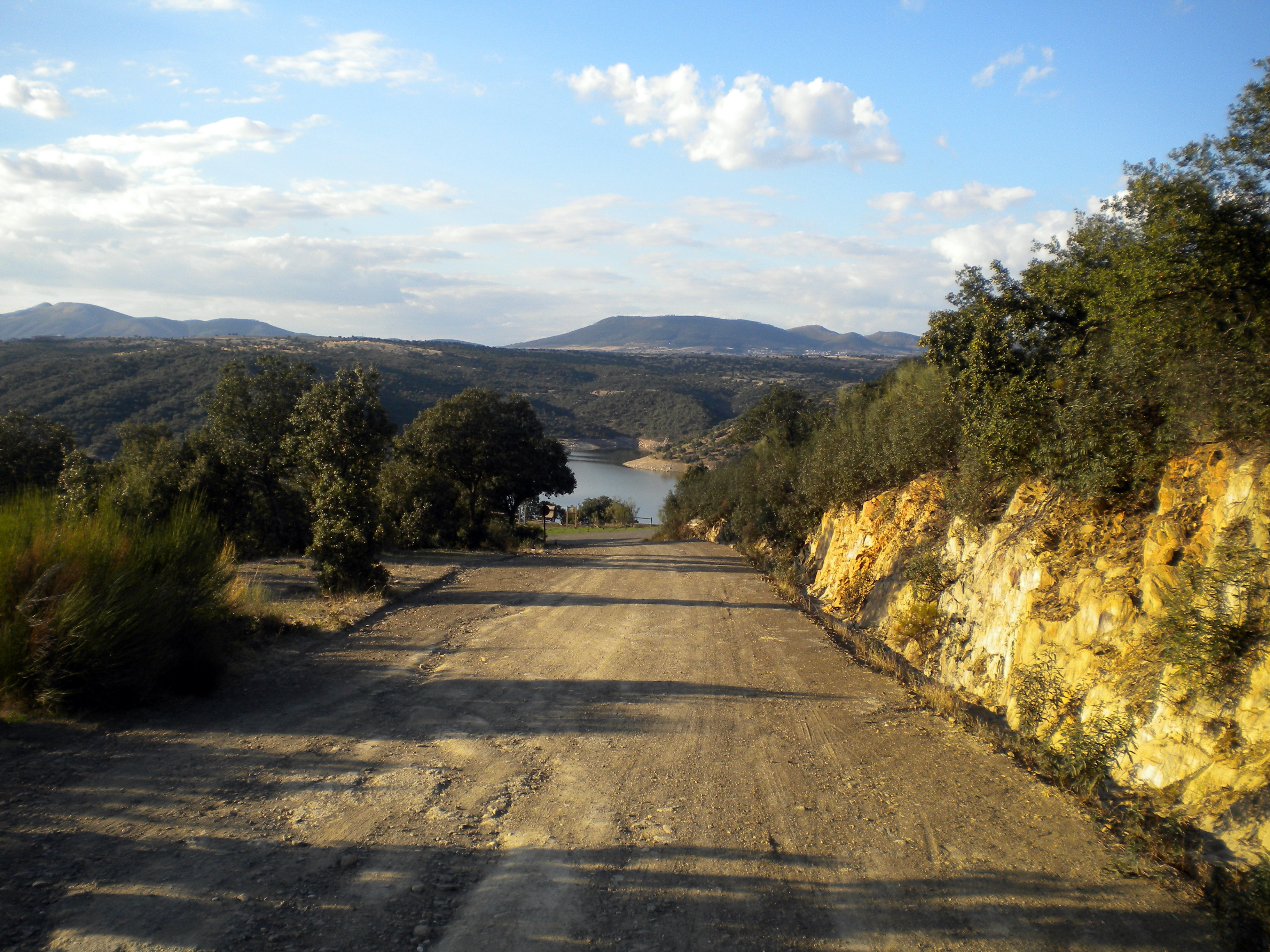 Camino de la Barca, entre el río Tajo y Talaván (Extremadura, España)